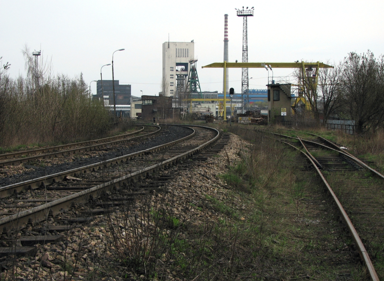 KWK Zofiówka